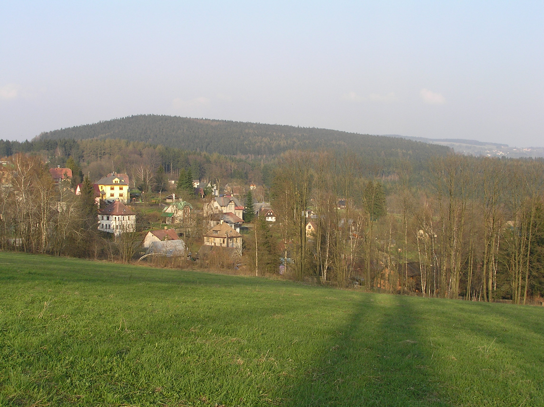 Hradešín, pohled z Rádla